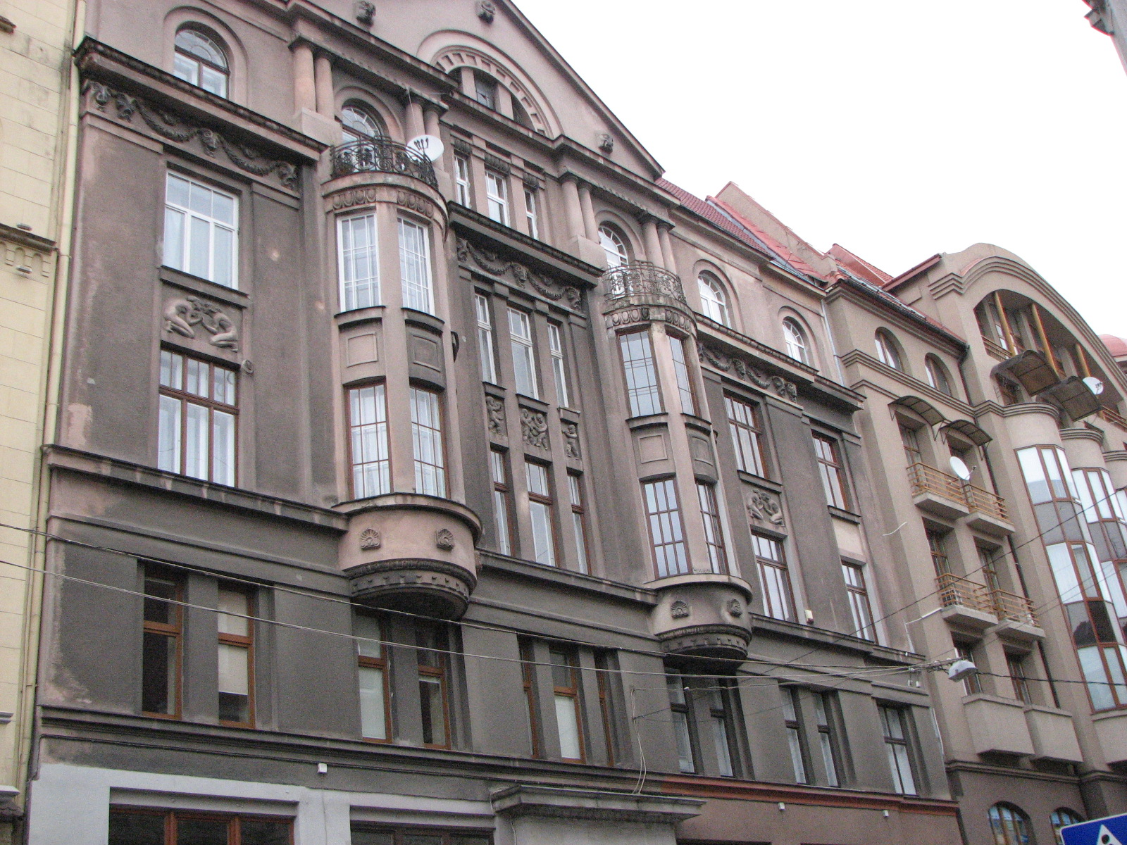 житловий будинок, Львів, Валова, 13